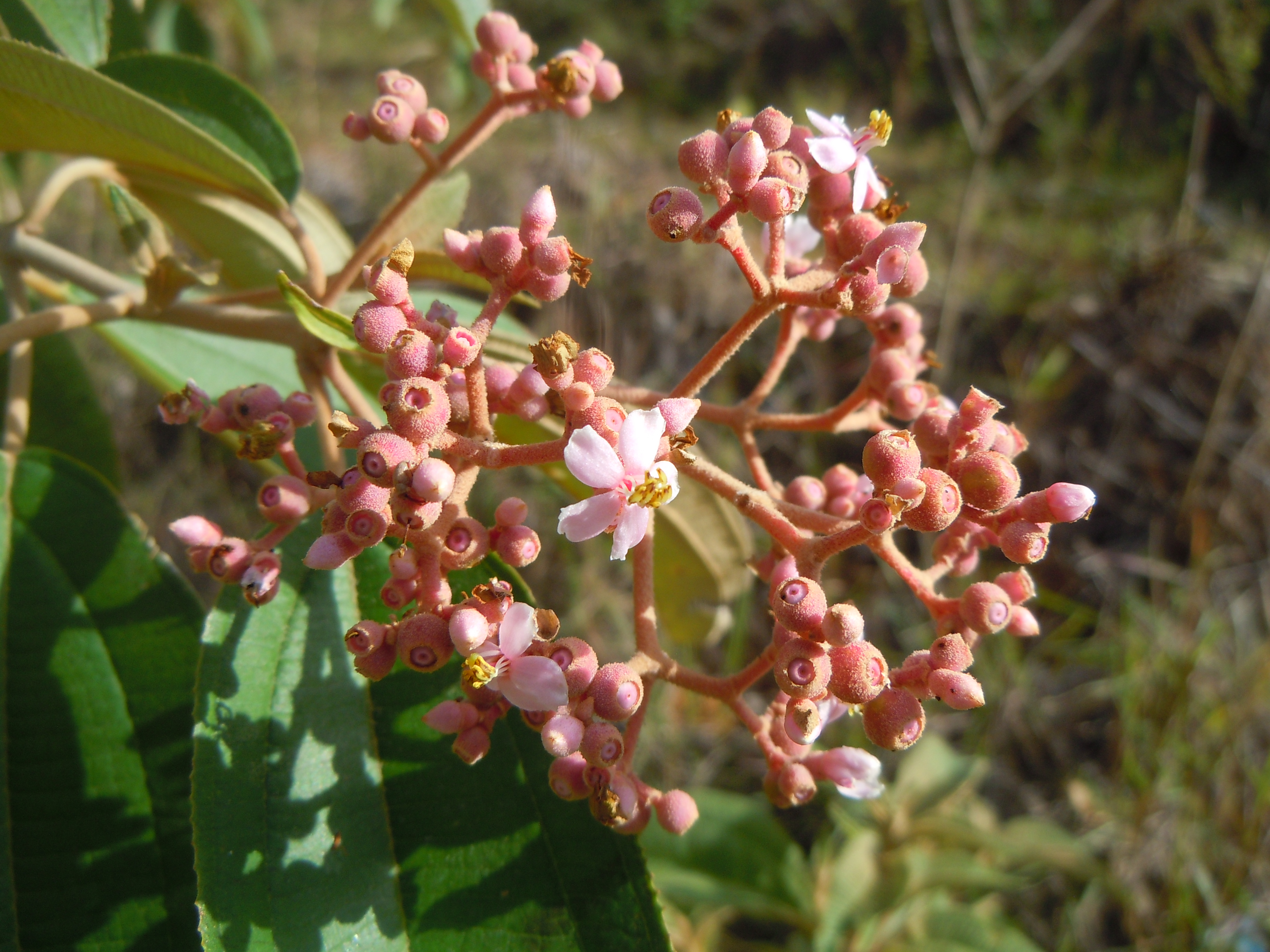 Branche